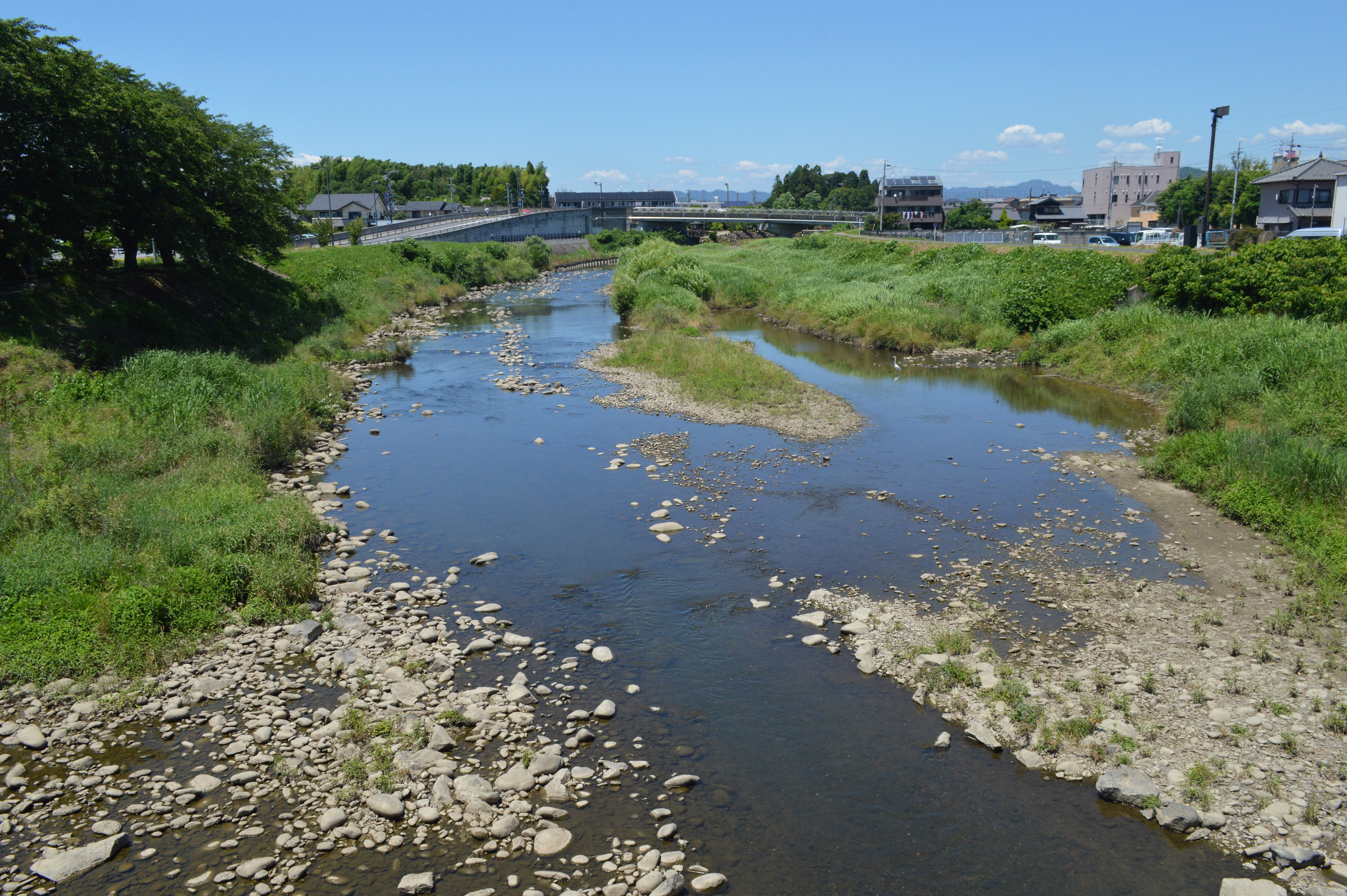 可児川。岐阜県可児市の岐阜県道341号から。